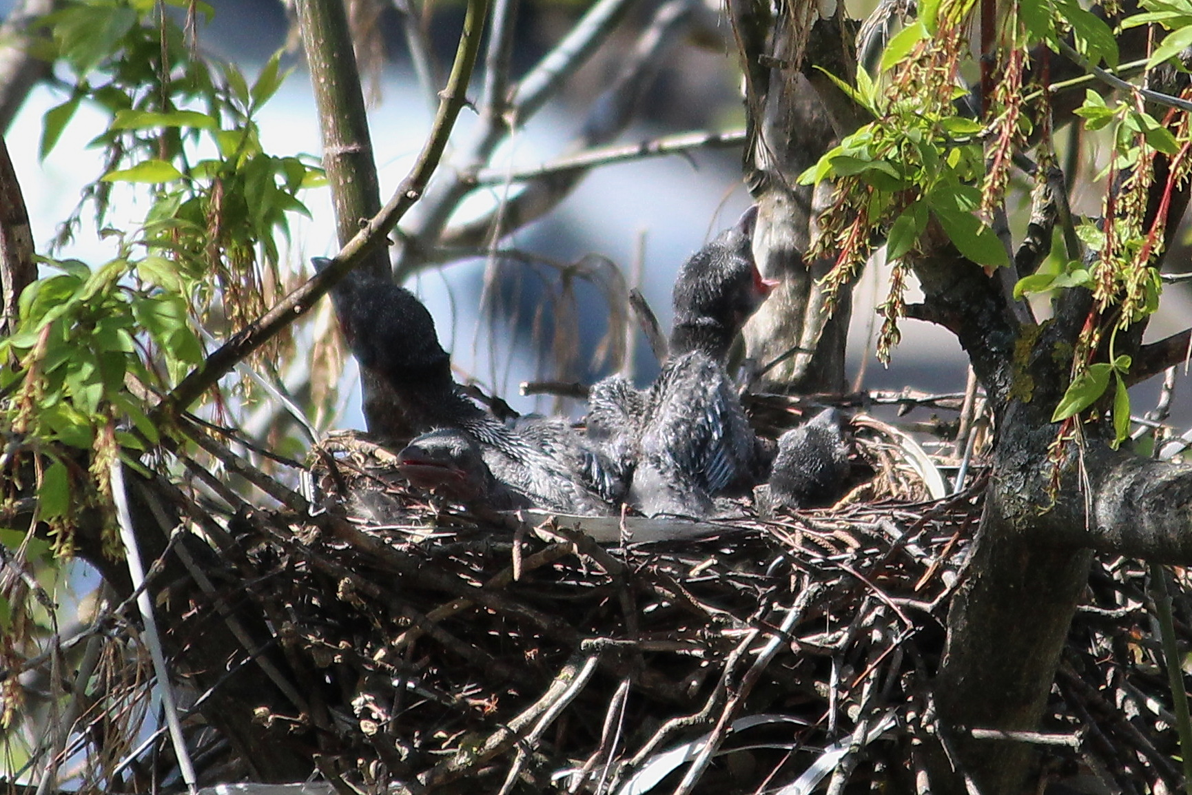 Corvus cornix 10 days